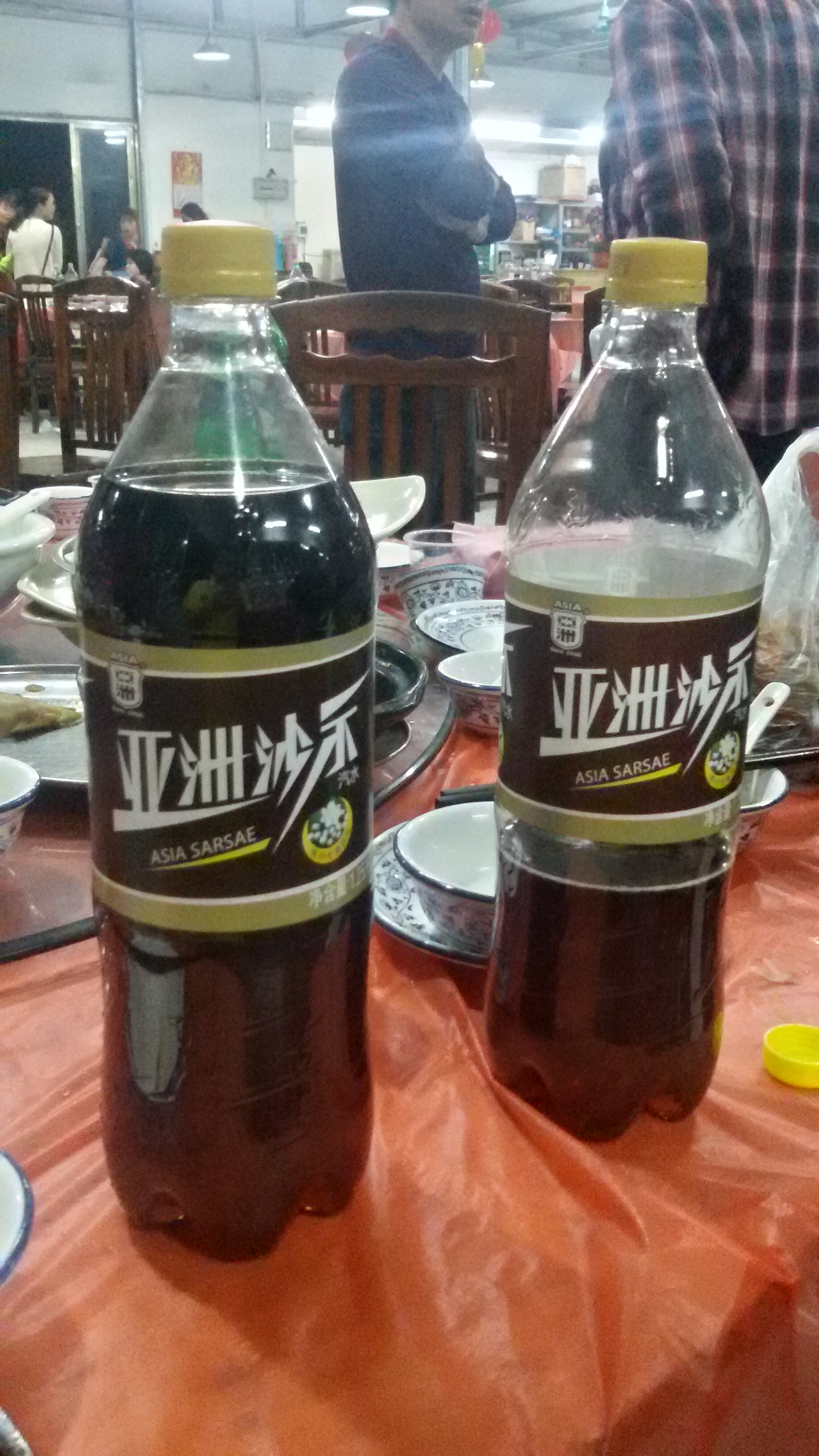 粵語: 兩支亞洲沙示汽水